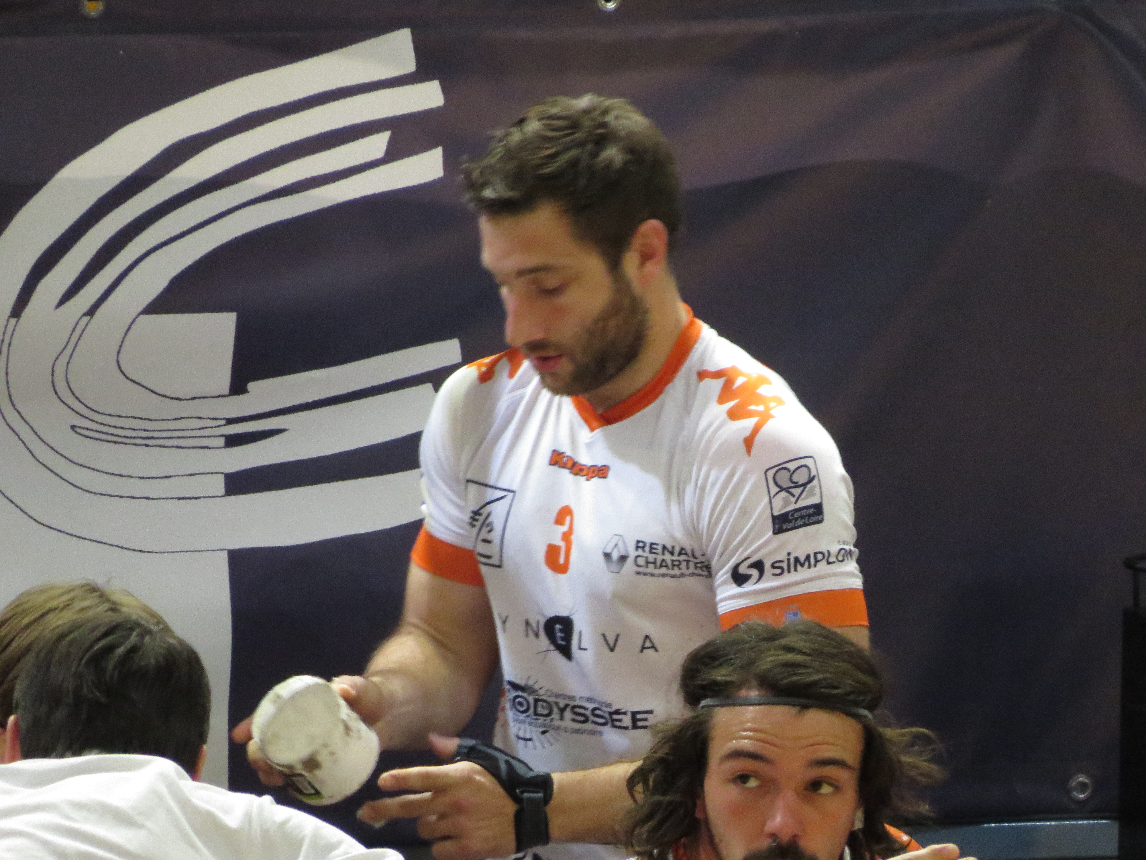 Match du championnat de France de Hand entre Créteil et Chartres Victoire de Créteil 39 - 35 3 : Alric Monnier